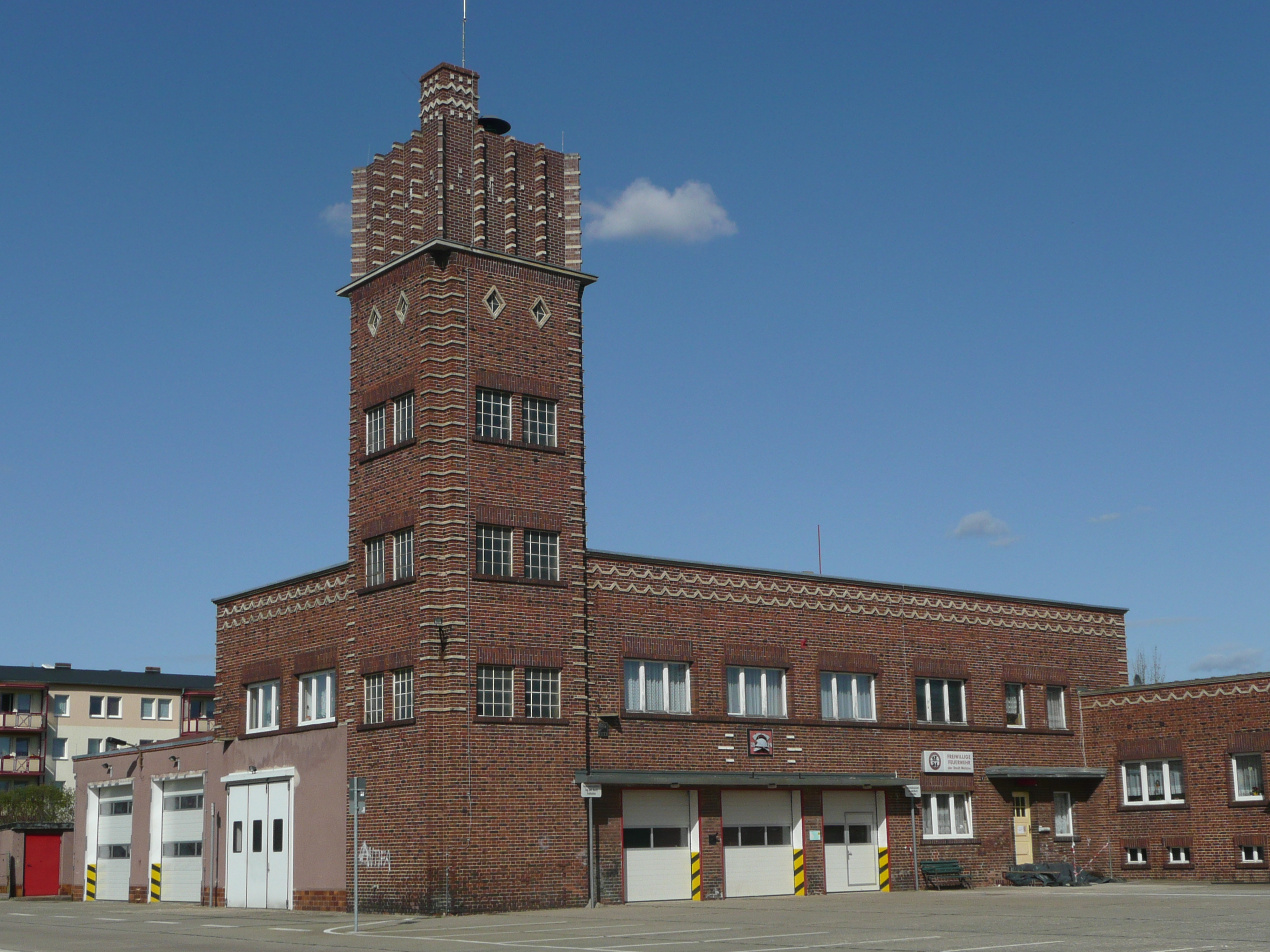 Das Feuerwehrdepot der Stadt Welzow